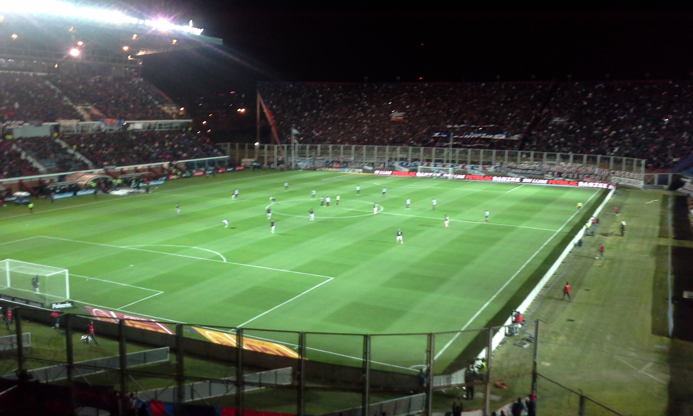 San Lorenzo enfrentando a Racing por el campeonato de primera división 2015.